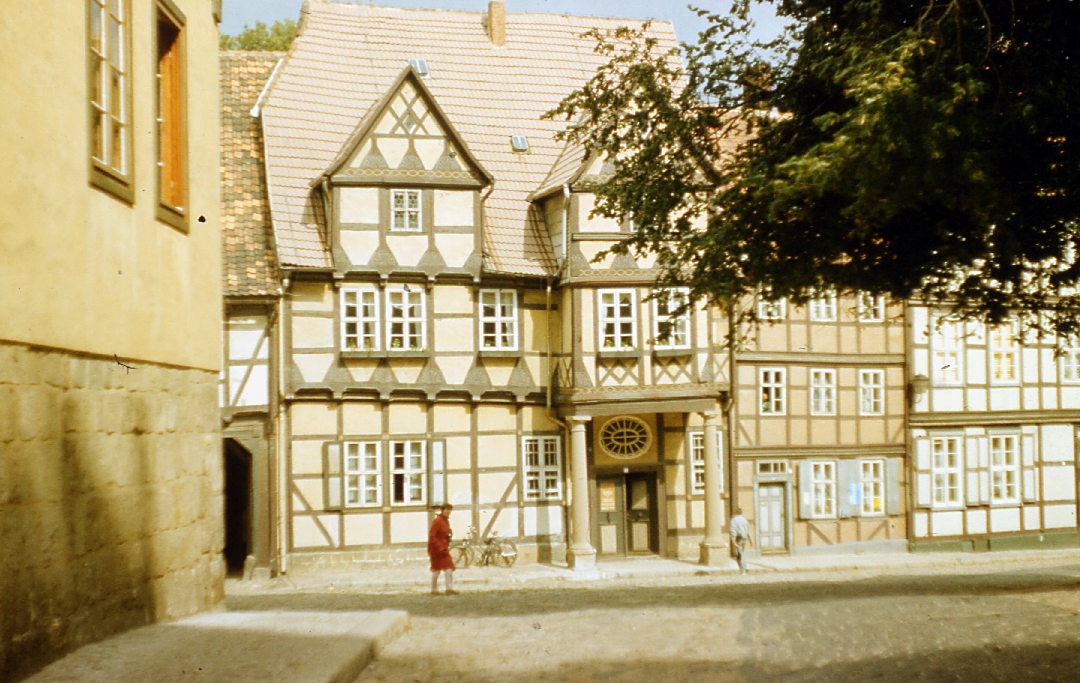 Harz 1986